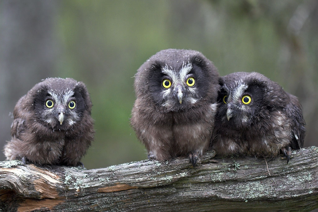 Juveniles of Aegolius funereus